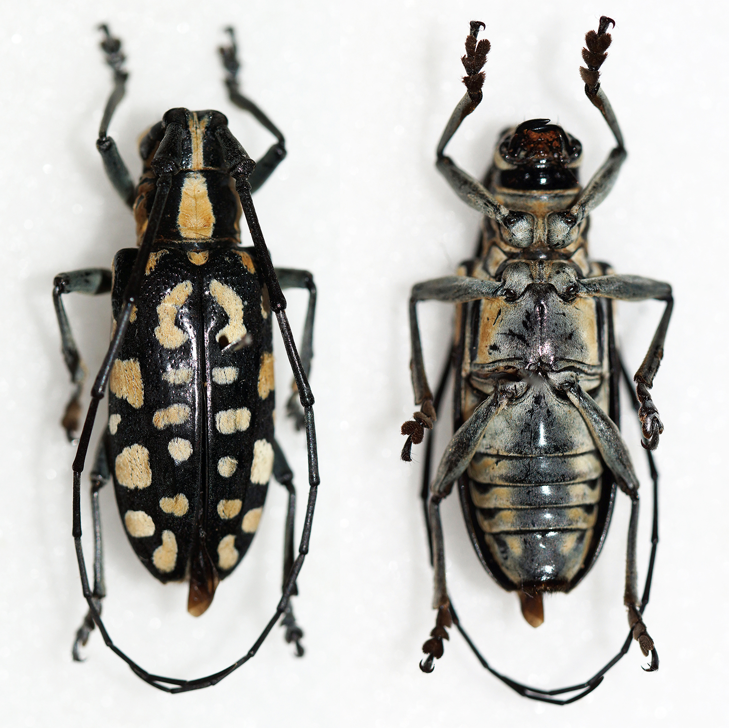 Aurivillius,1927 Sex: Female Data: 06-2014 - Sta Ana - Cagayan - North Luzon - Philippines Size: 24mm